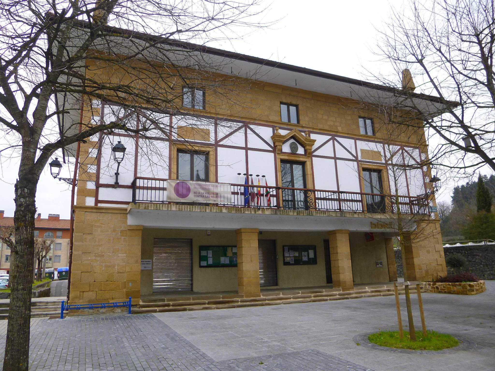 Ayuntamiento de Bedia (Bizkaia)